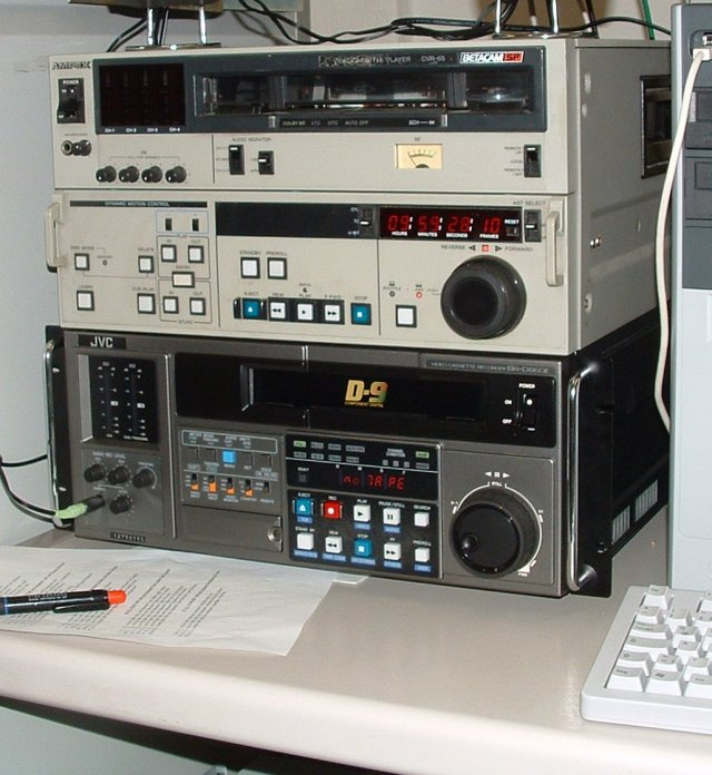 Vorderansicht von zwei MAZen (Beta-SP und D9)